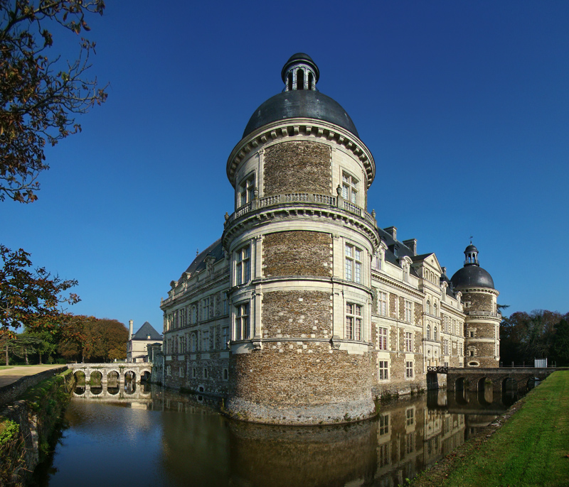 Château de Serrant, Maine-et-Loire, Pays de la Loire, France.